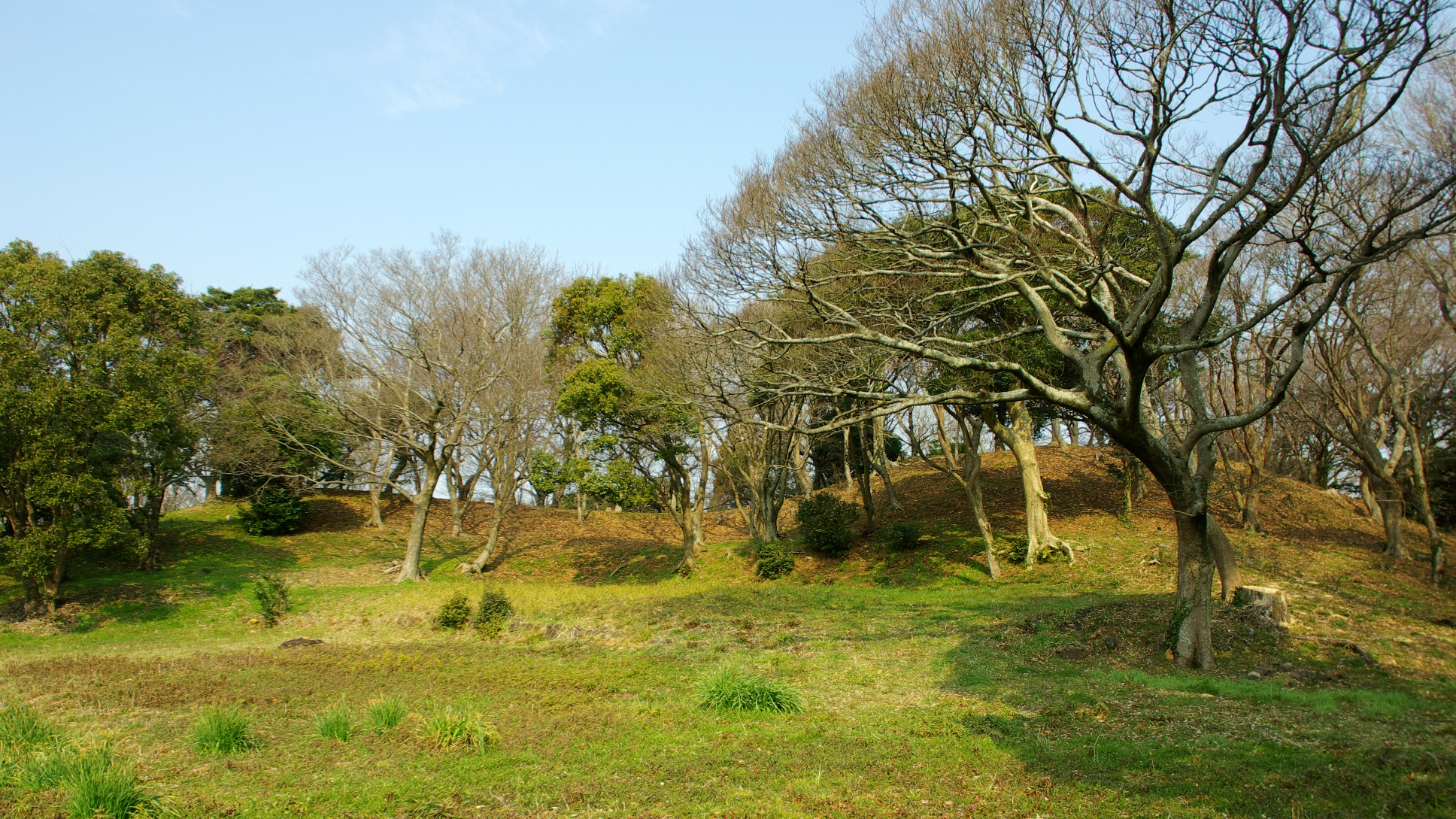 愛知県西尾市正法寺古墳全景。右側が後円部、左側が前方部。